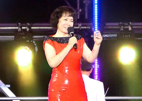 2016년 8월 7일 부산 현인가요제에서 김상희.